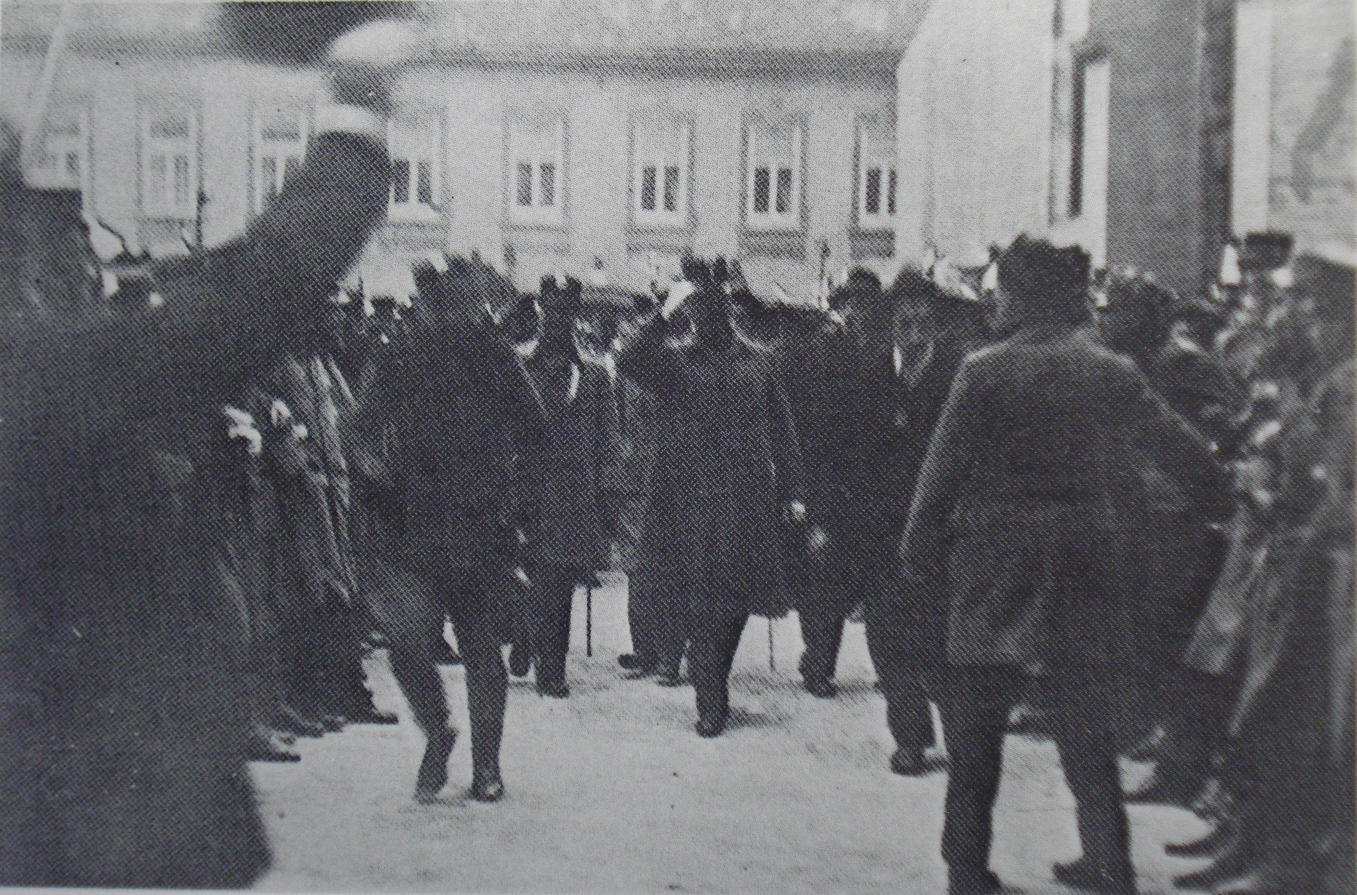 Generali stižu pred sabor.jpg